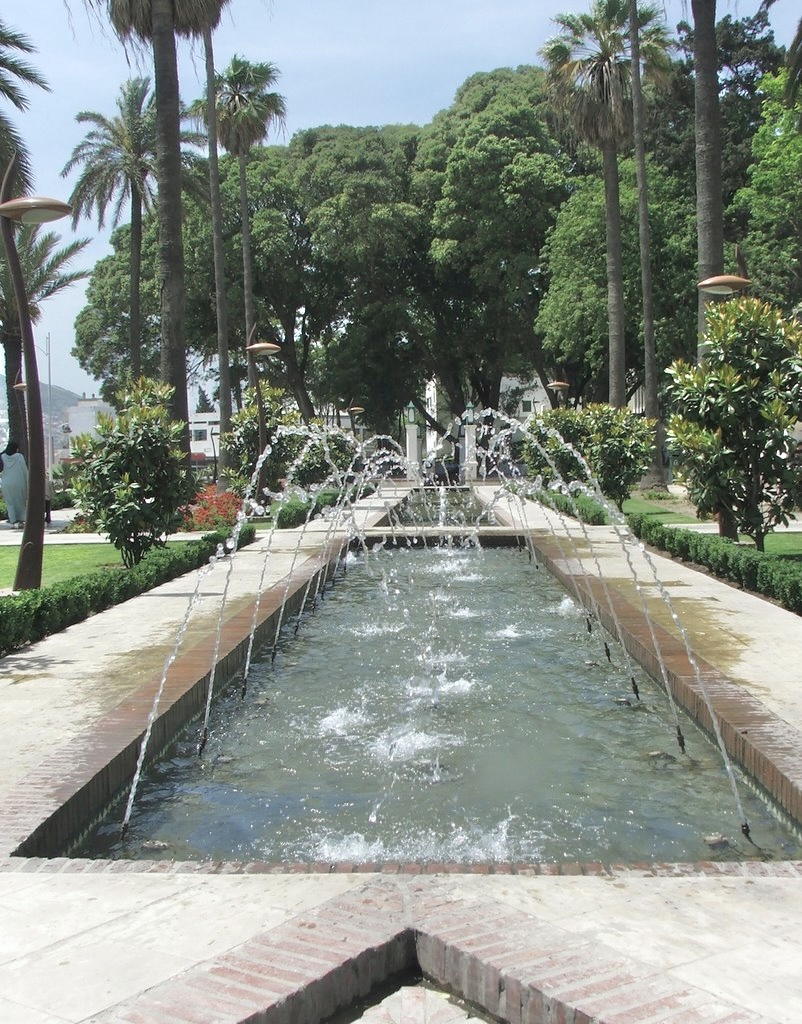 Tetouan